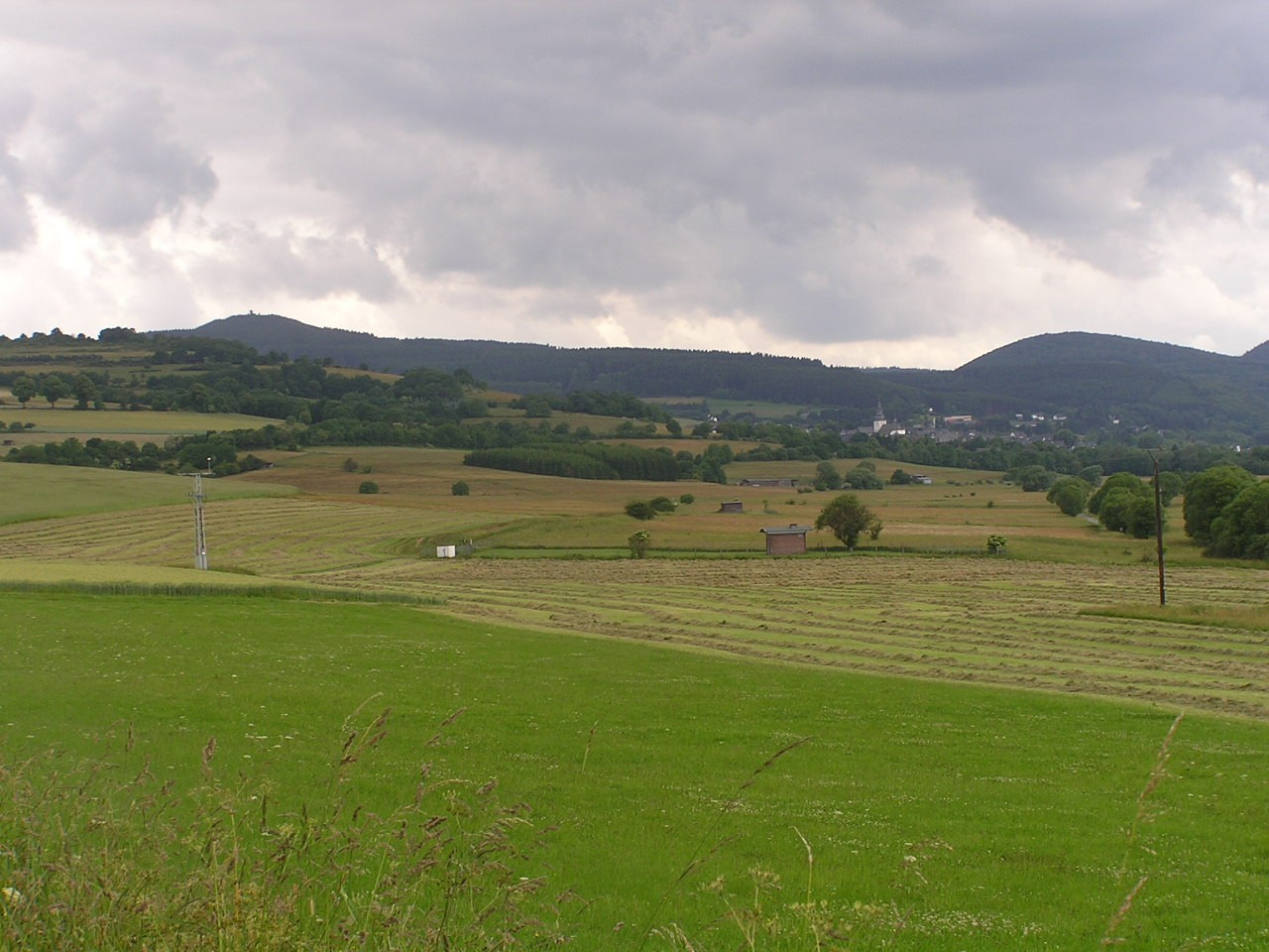 Naturschutzgebiet Nuhnewiesen östlich von Hallenberg von Osten aufgenommen. Im Bildhintergrund die Kirche von Hallenberg.